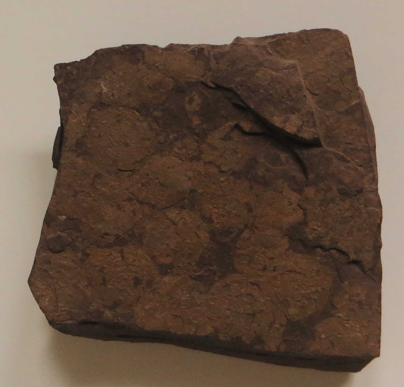 Fossil of Steinmannia - Took the picture at Museum am Lowentor, Stuttgart